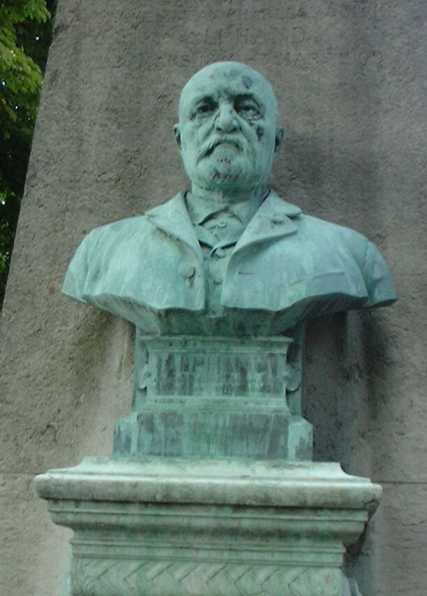 Tombe ornée d'un buste en bronze signé Jules Coutan, 1890.